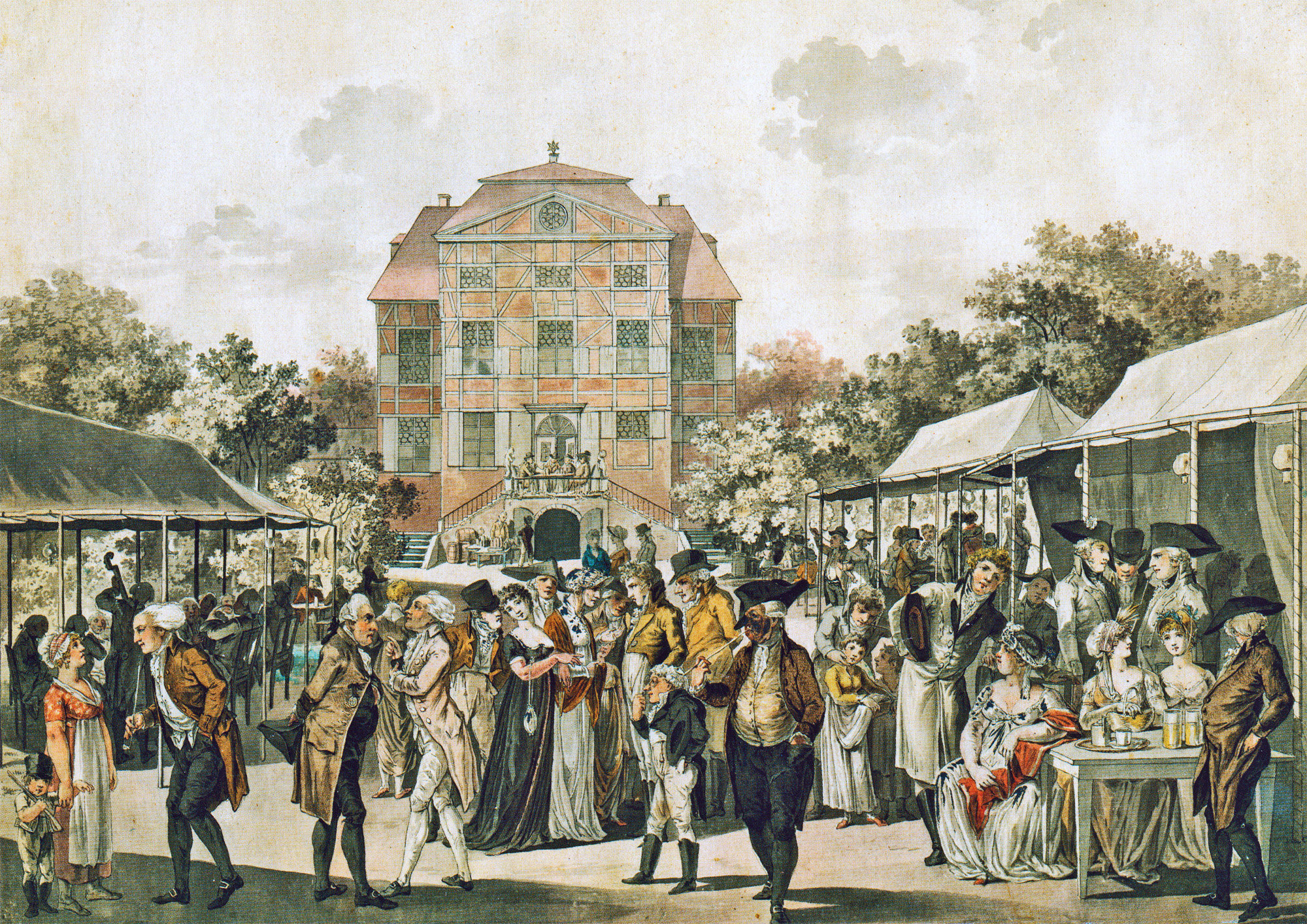 Konzert im Großbosischen Garten in Leipzig